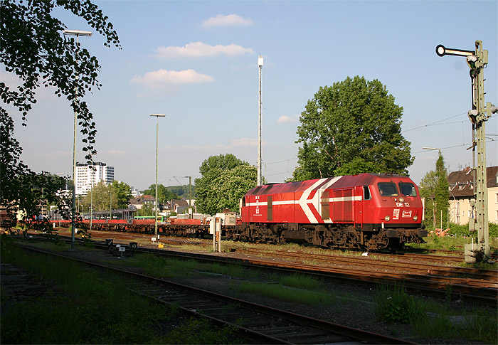 DE 12 steht mit Containertragwagen abfahrbereit in Bergisch Gladbach, DE.